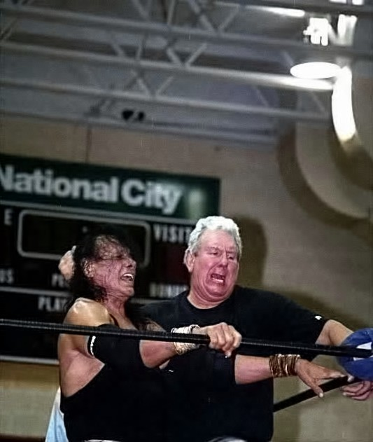 Wrestling legend Jimmy Snuka takes on Bob Orton Jr. on 3/28/09 from Franklin PA